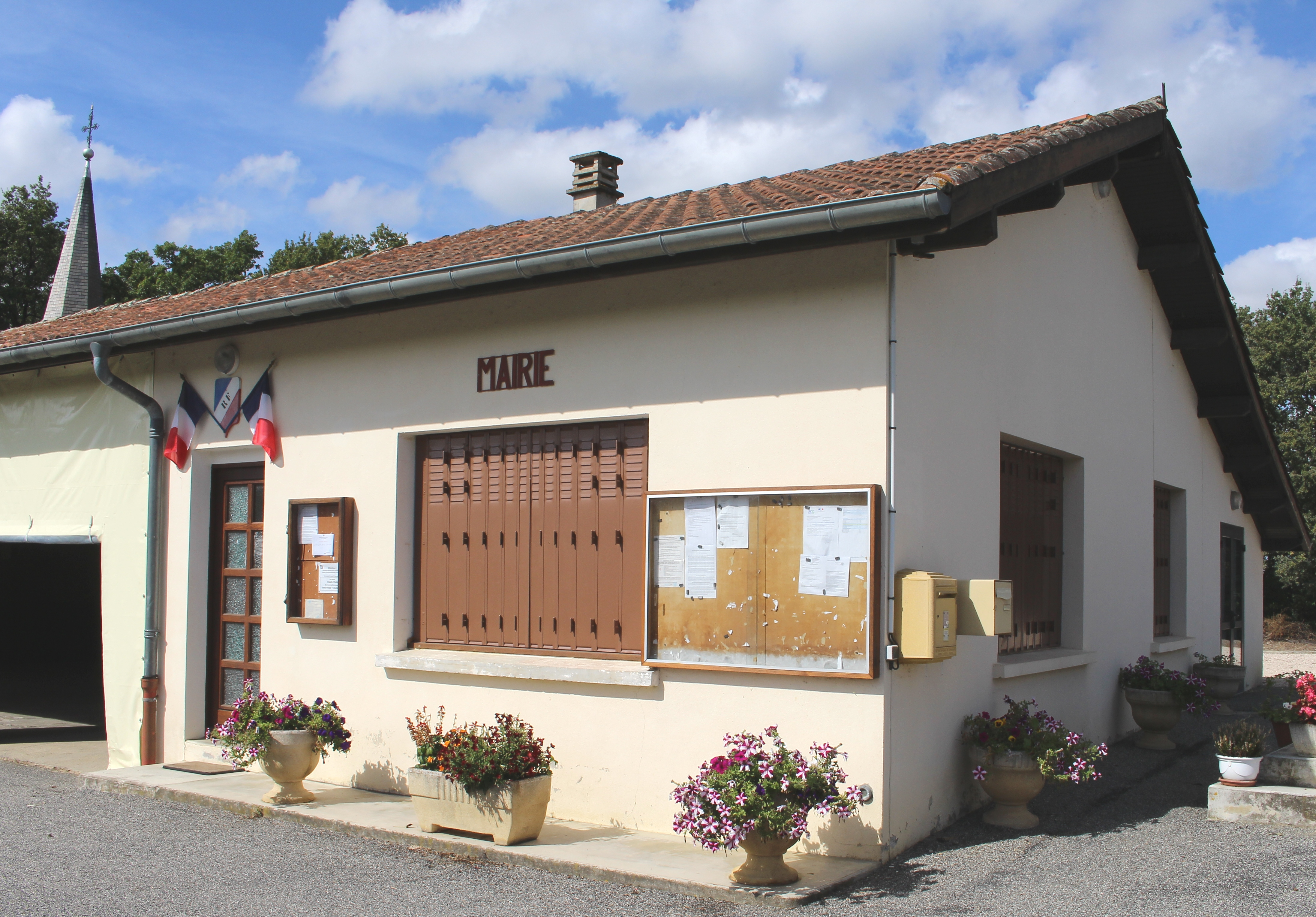 Mairie de Villemur (Hautes-Pyrénées)